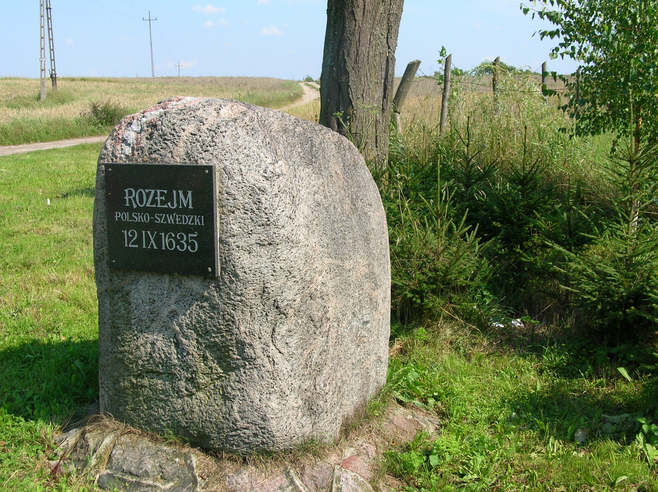 Sztumska Wieś, memorial stone